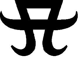 あゆマーク